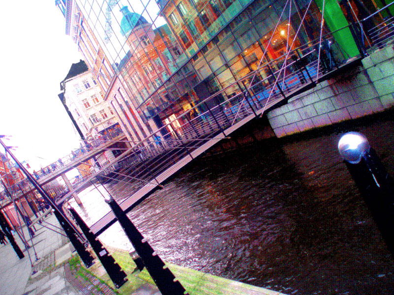 Calle Aboulevarden.